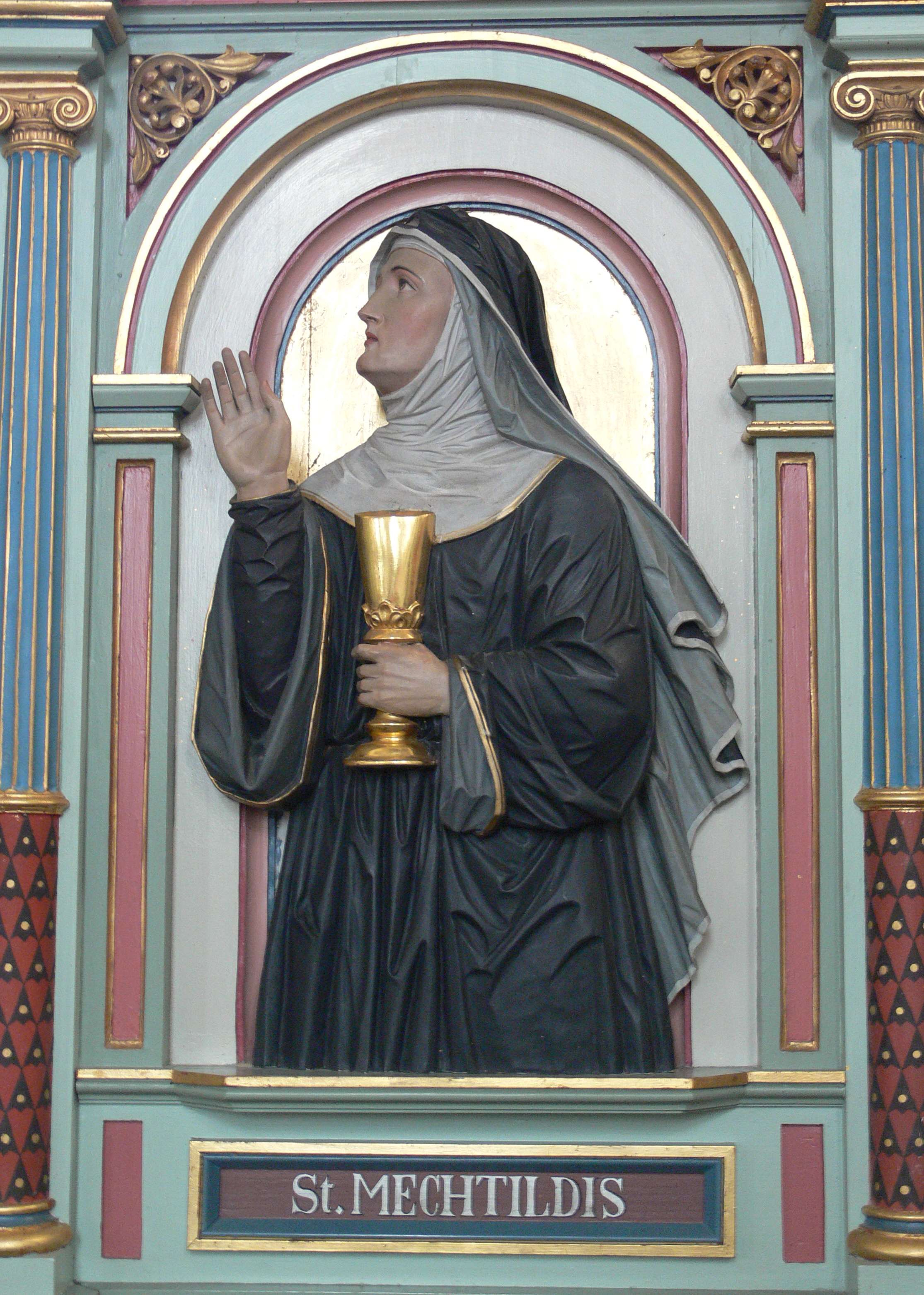 Kath. Pfarrkirche St. Gordian und Epimachus, Merazhofen, Stadt Leutkirch im Allgäu, Landkreis Ravensburg Chorgestühl, 1896, Bildhauer: Peter Paul Metz Mechthild von Magdeburg